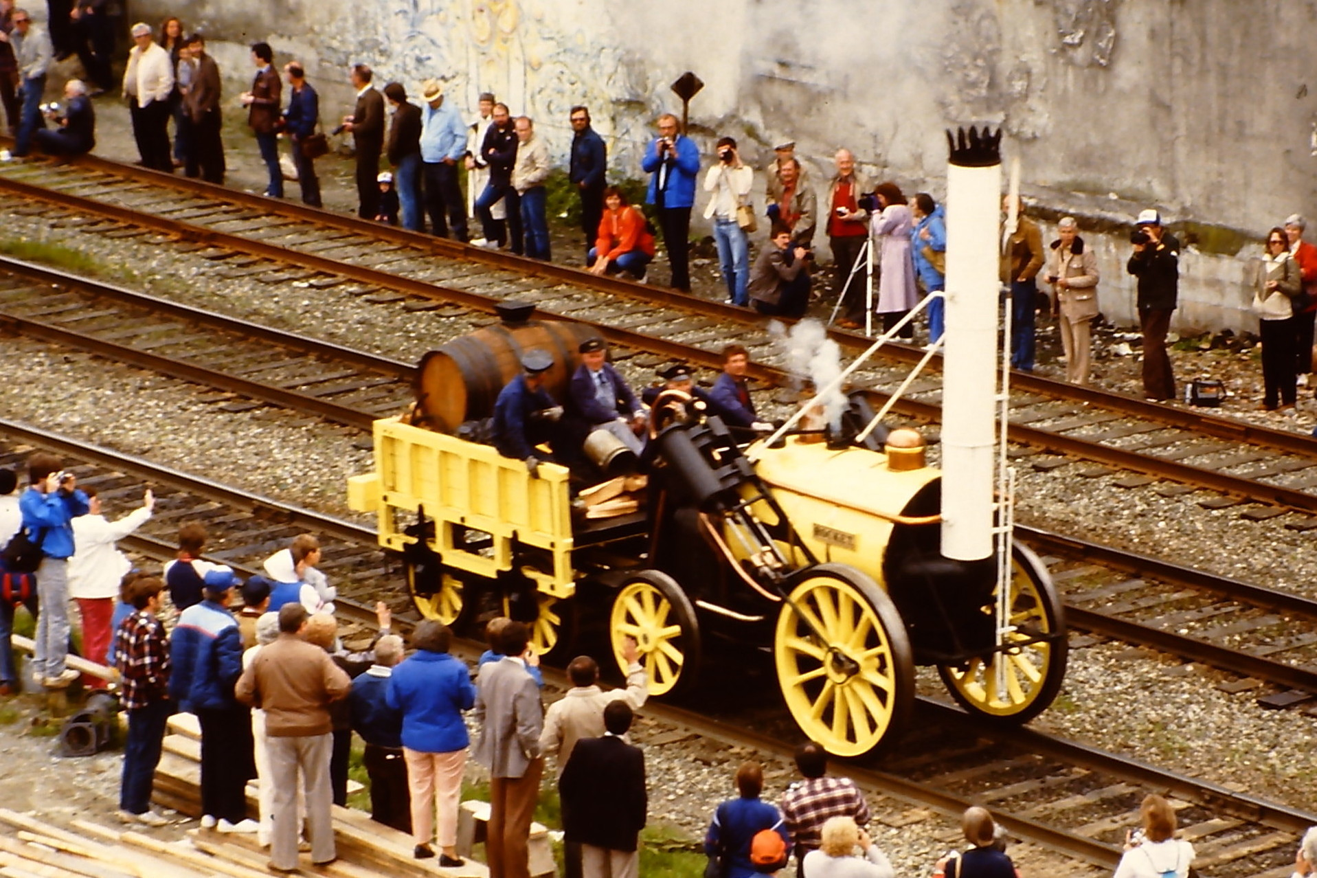 Dampflokomotive Rocket (Replikat) auf der SteamExpo 86